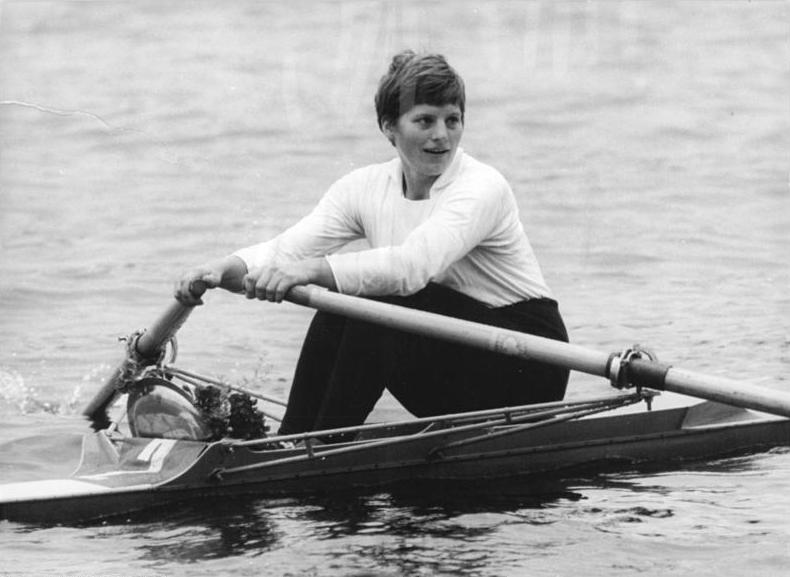 Rosemarie Schmidtke Zentralbild Wendorf 31.7.1965 Verbands-Ruder-Regatta in Berlin-Grünau am 31.7.1965 Im Frauen-Einer konnte sich Rosemarie Schmidtke (TSC Berlin) den Regattapokal erkämpfen.